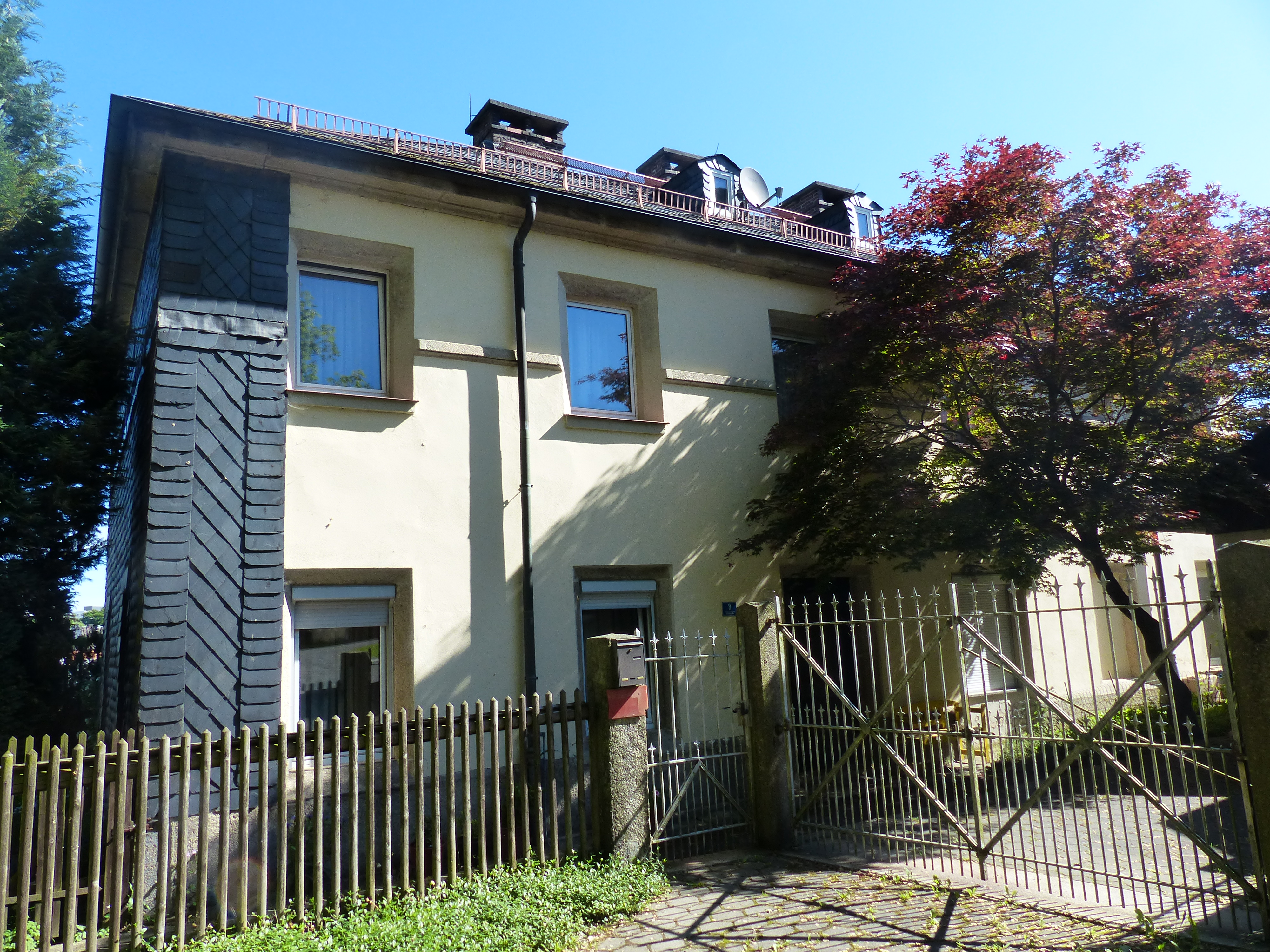 Bilderserie Baudenkmäler in Kirchenlamitz